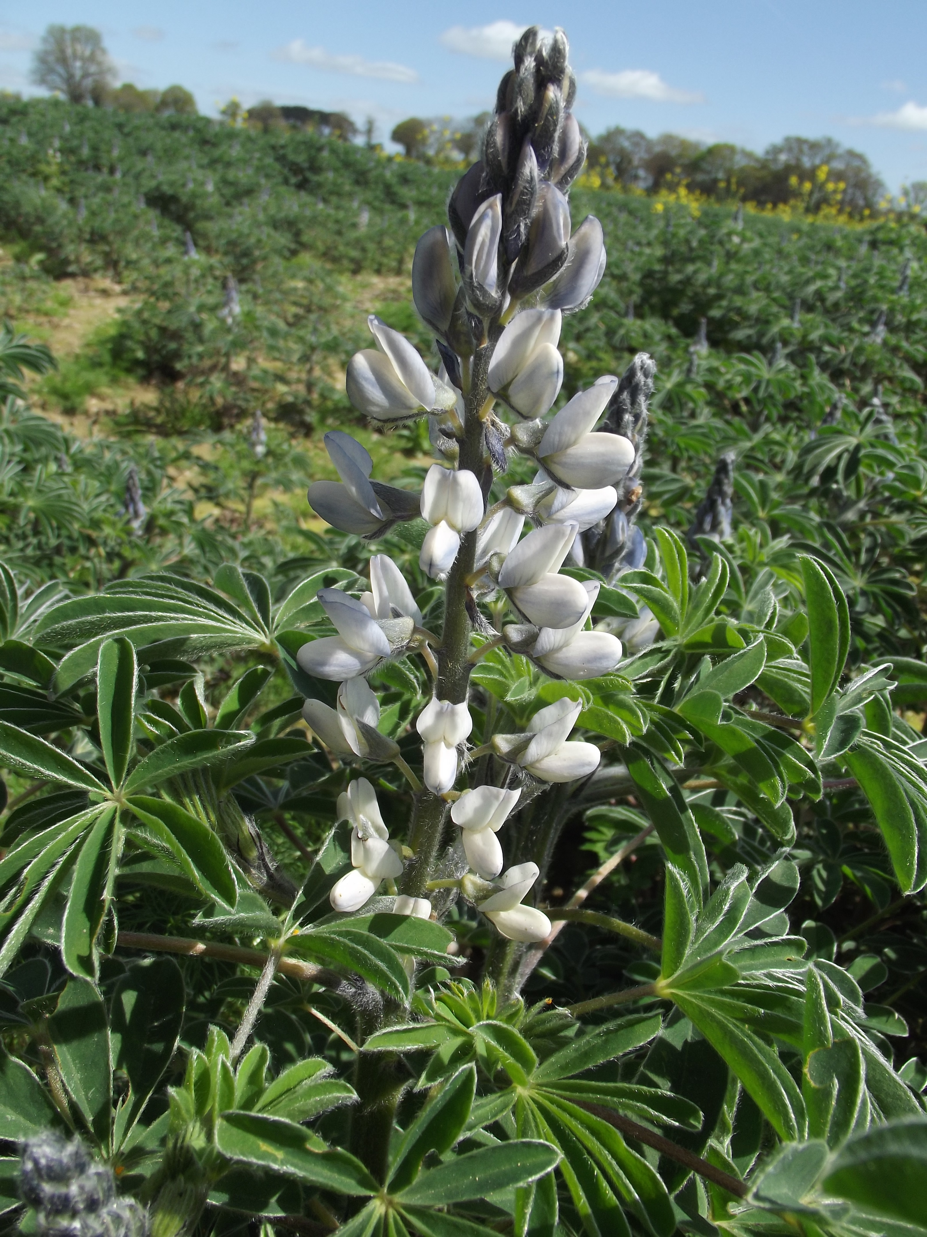 Lupinus albus L. [Détermination : Jean-Claude ECHARDOUR] Localisation : Nozay (44)